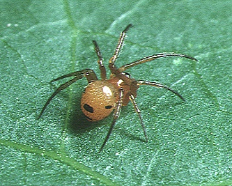 male Parasteatoda japonica from Okinawa.